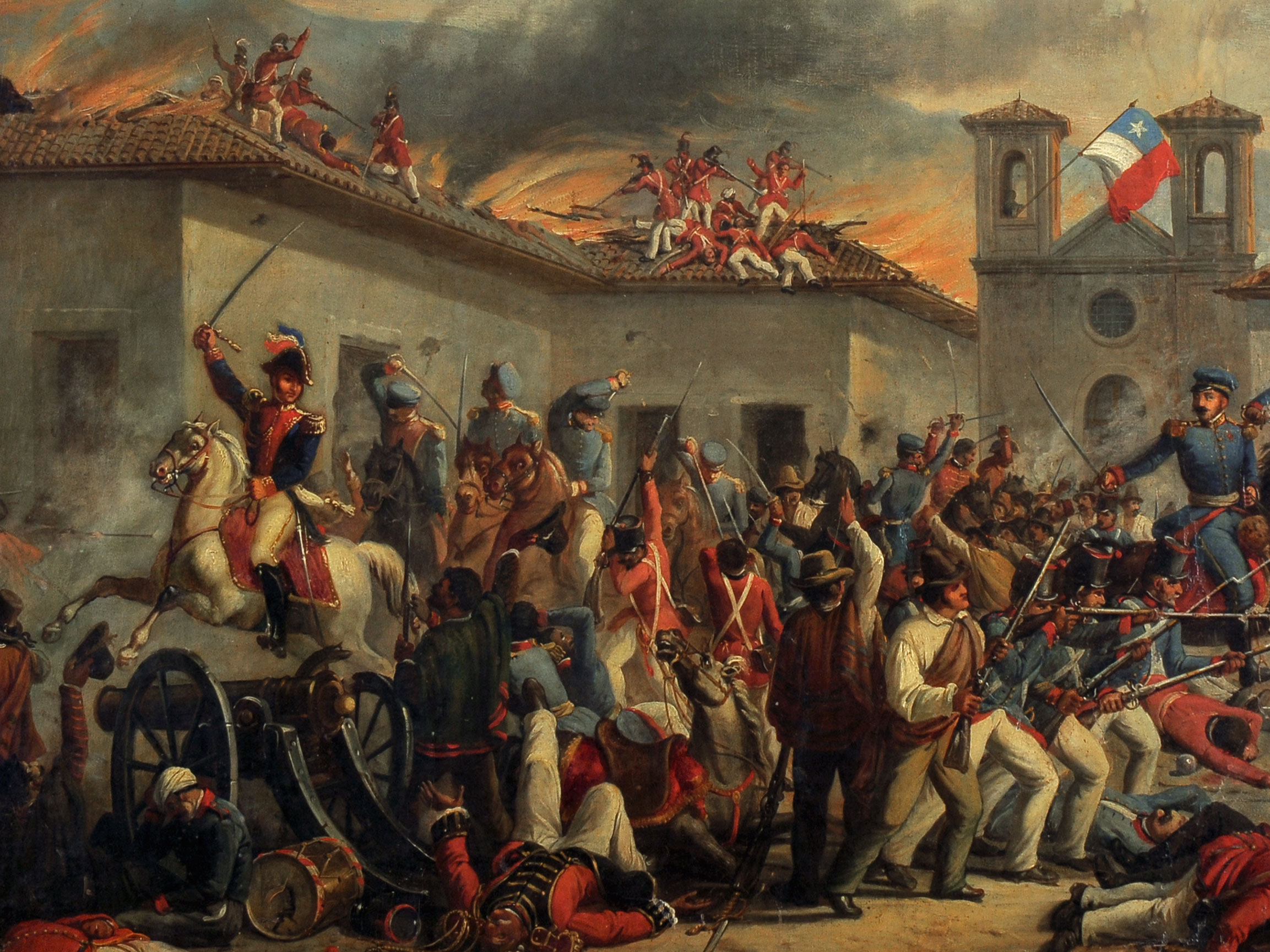 detail